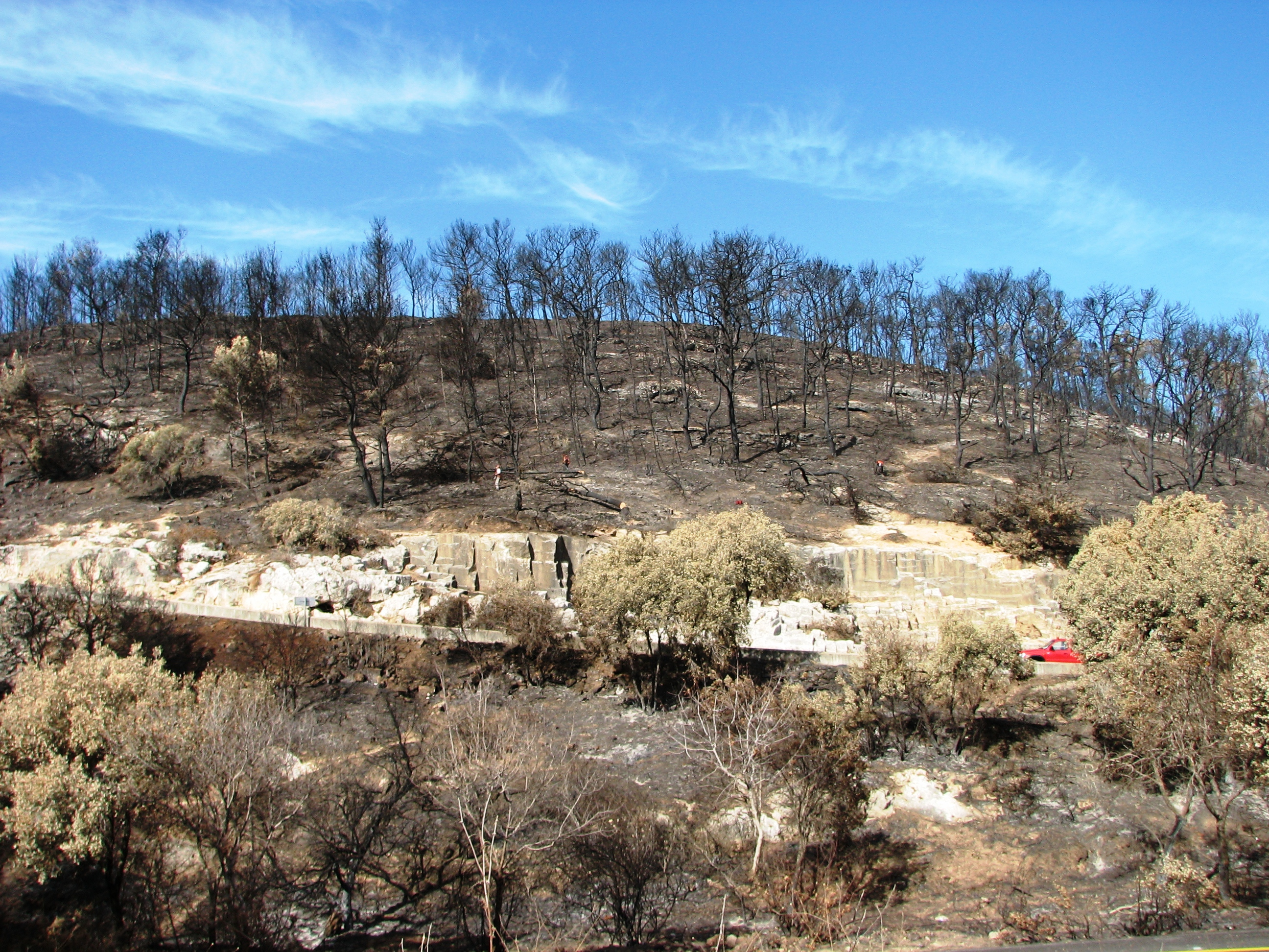 Kdumim Quarriesת, mount Carmel Israel מחצבות קדומים היא מחצבה קדומה של אבן גיר מהתקופה הרומית-ביזנטית הנמצאת בצד פיתול חד של כביש 721 העולה מעתלית לבית אורן אזור המחצבות לאחר השריפה בכרמל בחודש דצמבר 2010